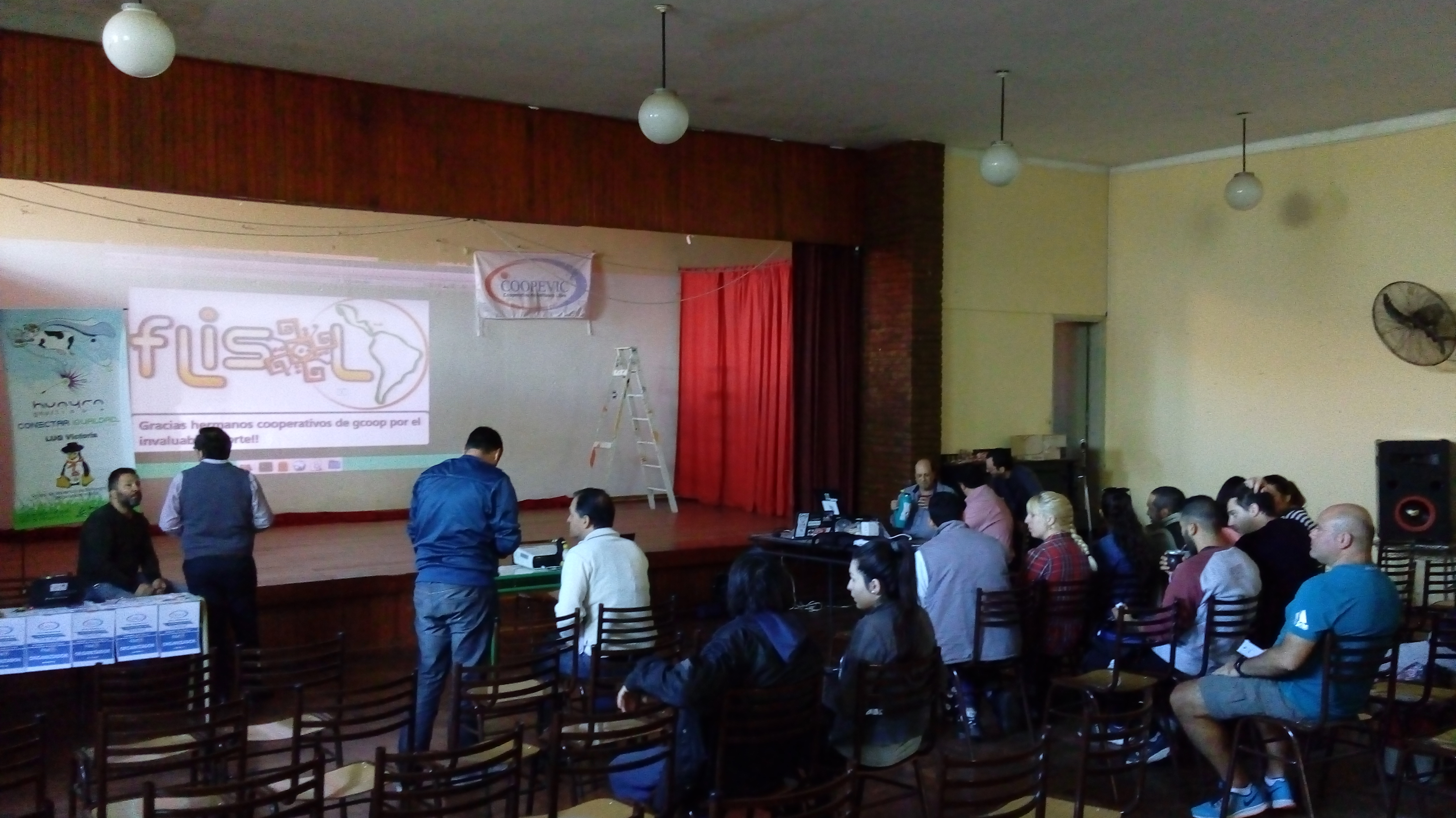 Arrancando Flisol Victoria 2017